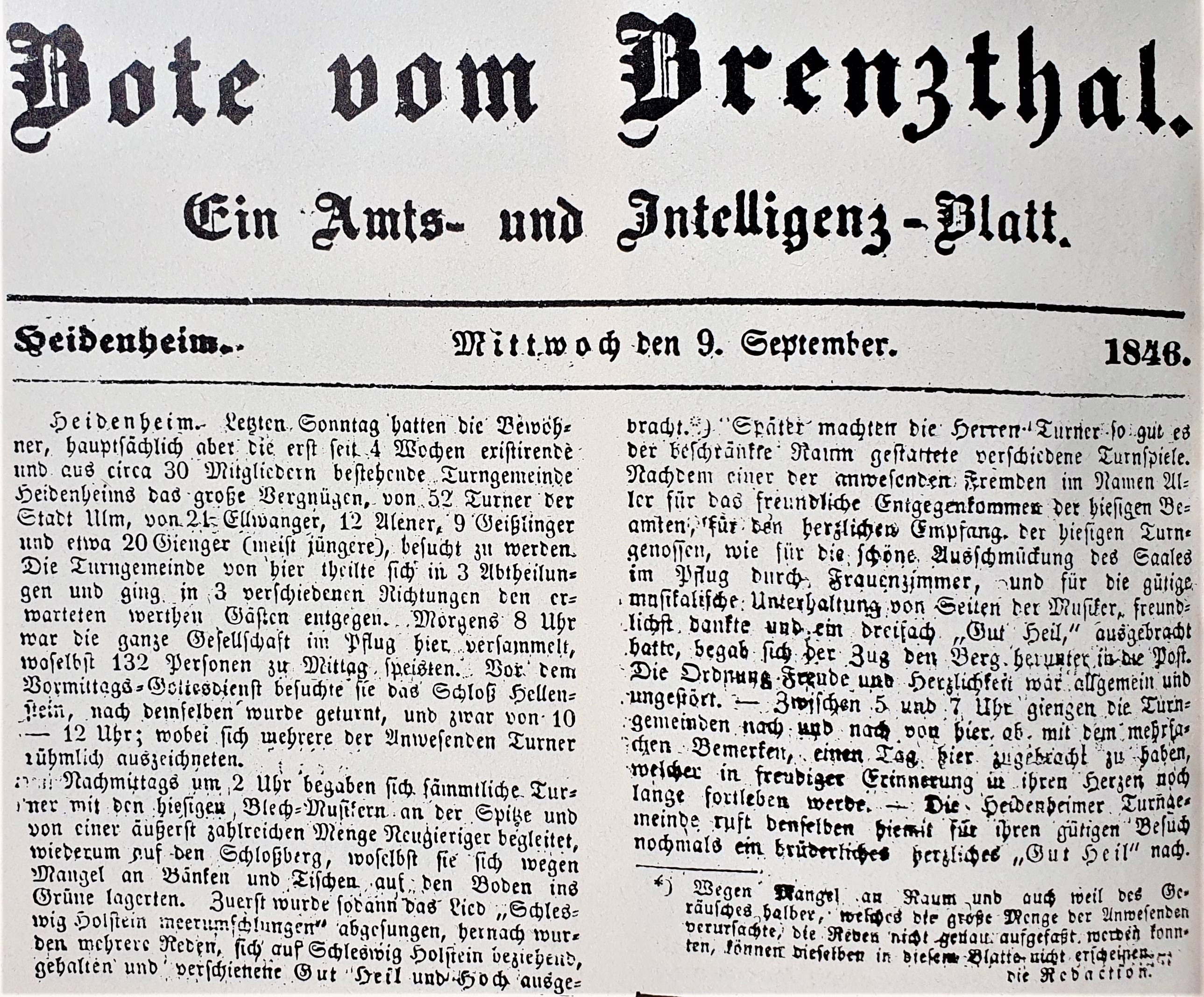 Diese Pressemitteilung im "Bote vom Brenzthal" vom 9. September 1846 bestätigt den Gründungstermin der Turngemeinde Heidenheim 4 Wochen zuvor.